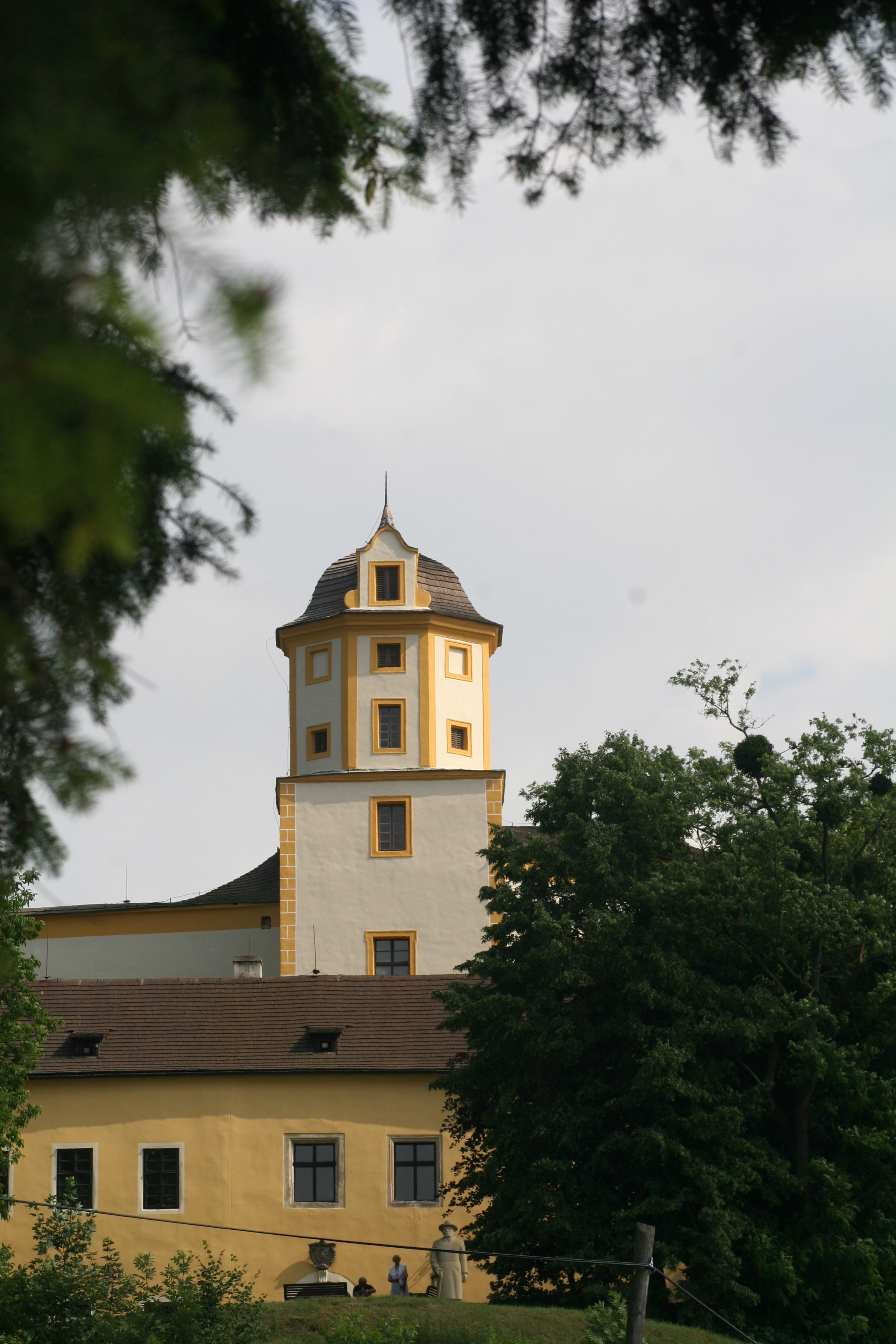 Průčelí hradu Malenovice